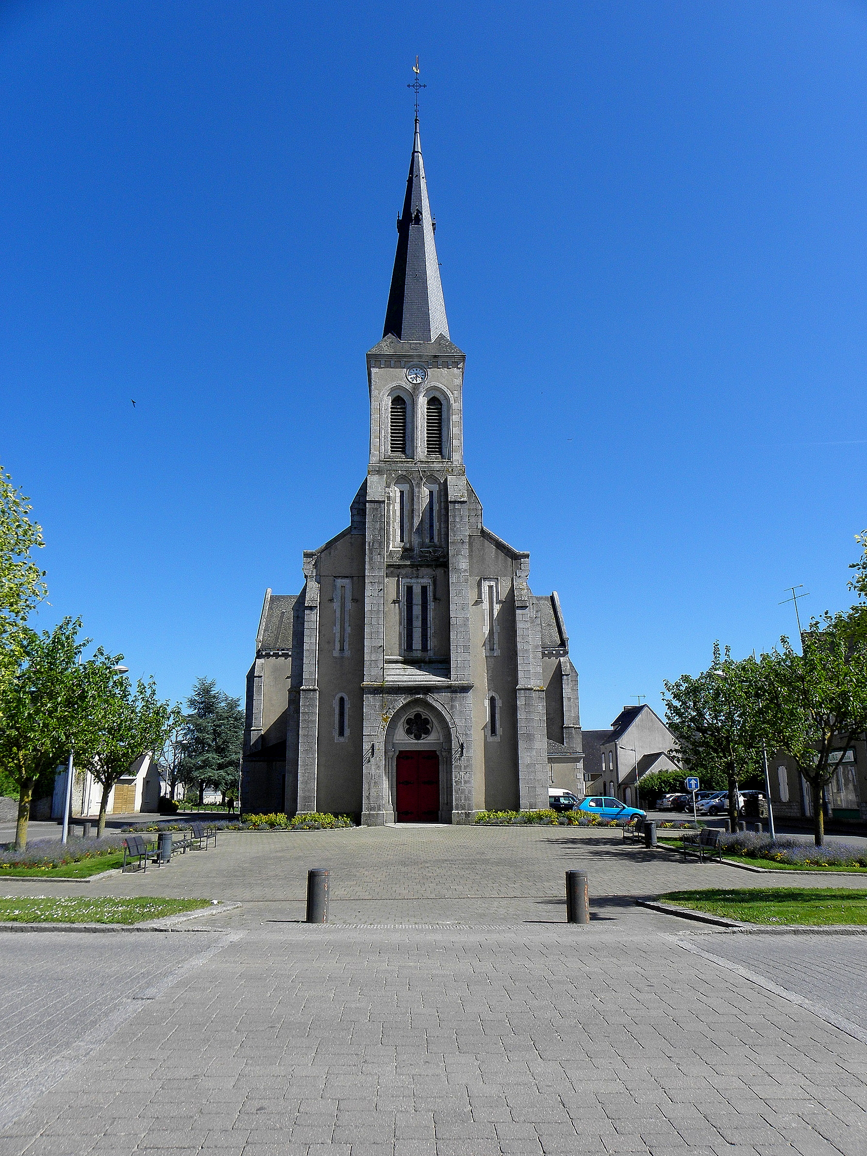 Église Saint-Martin de Louverné (53).